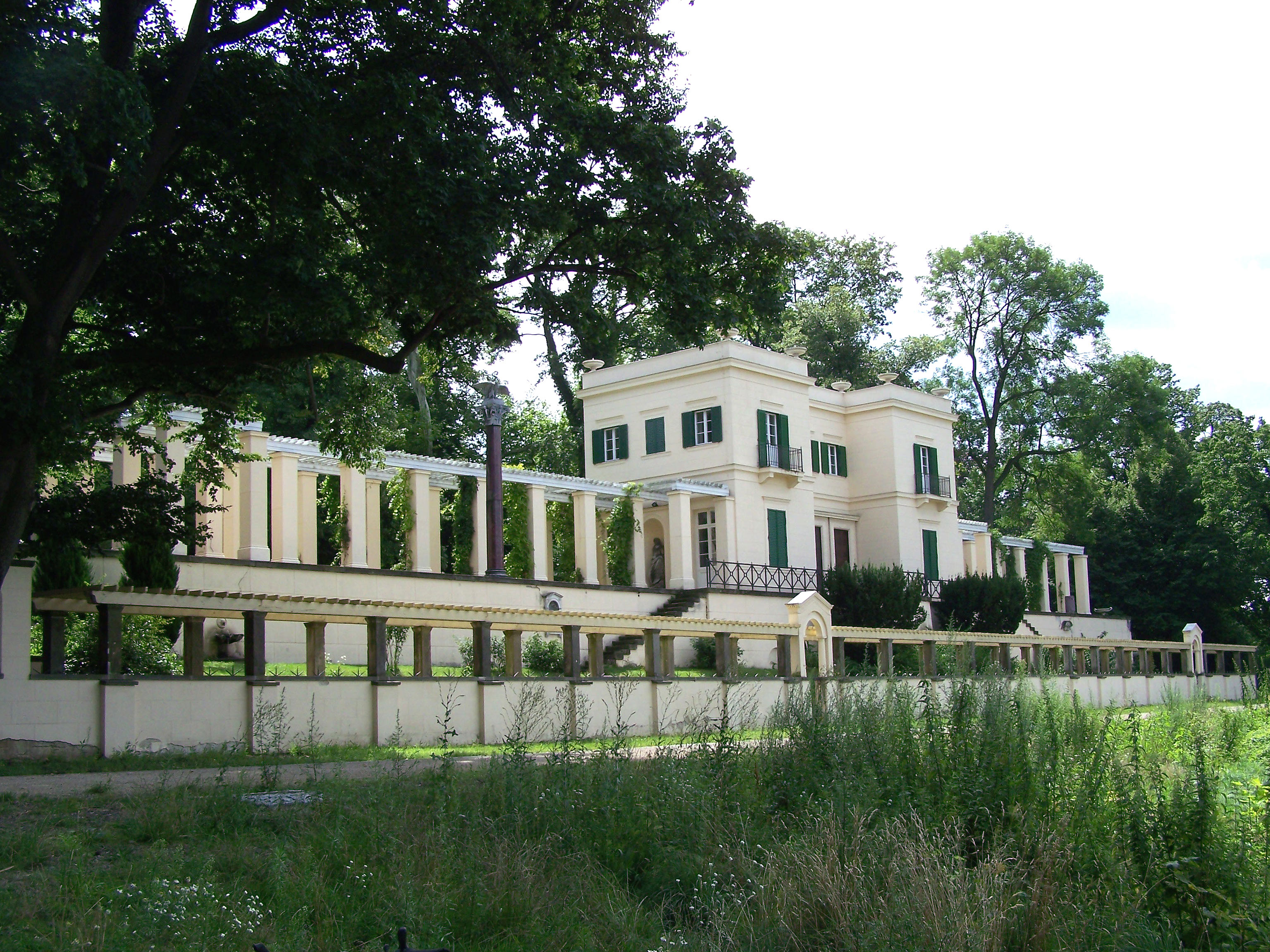 Casino in der Parklandschaft Klein-Glienicke